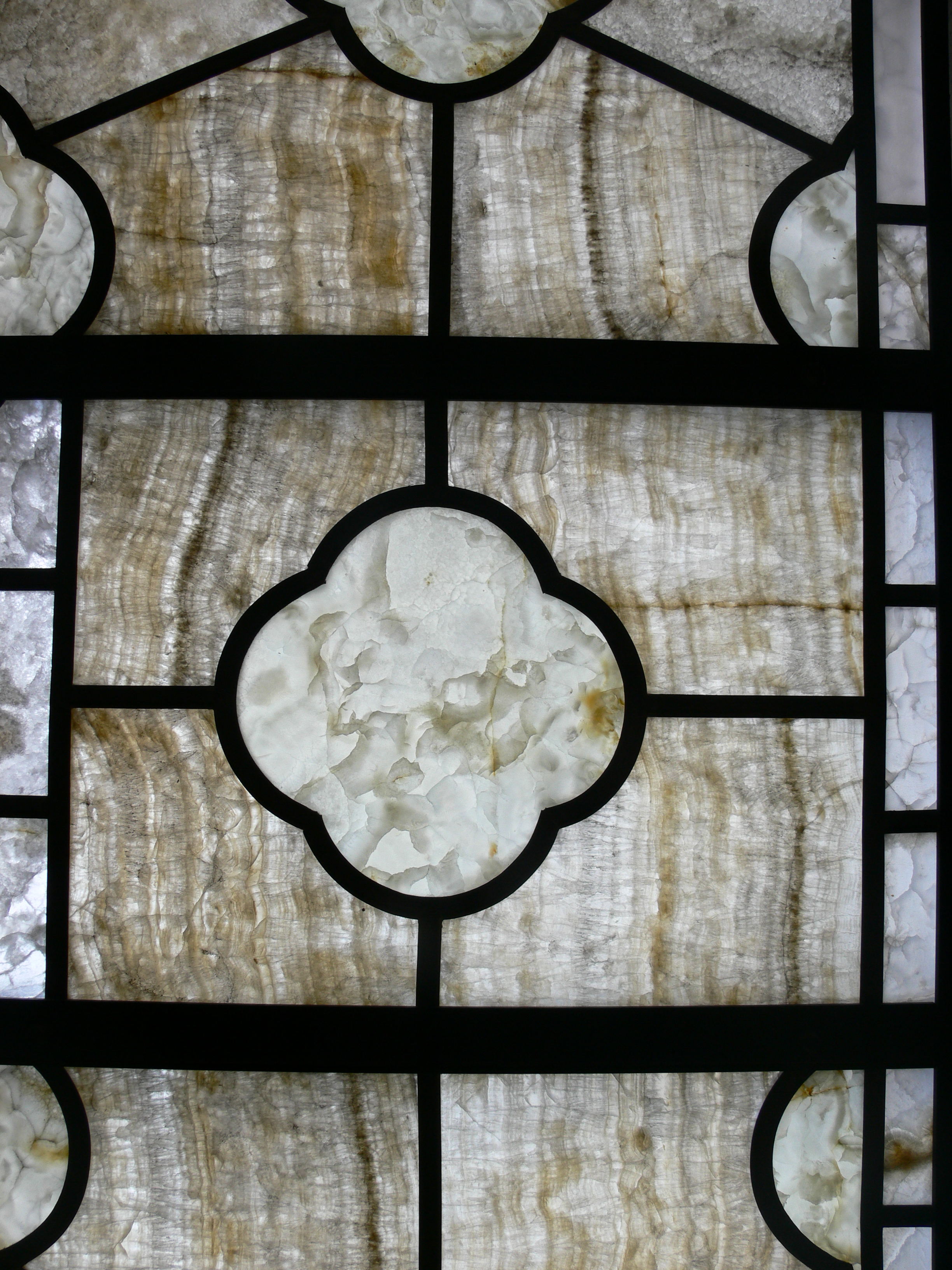 Abtei St. Erentraud, Kellenried, 88276 Berg, Landkreis Ravensburg Klosterkirche Onyx-Fenster, detail